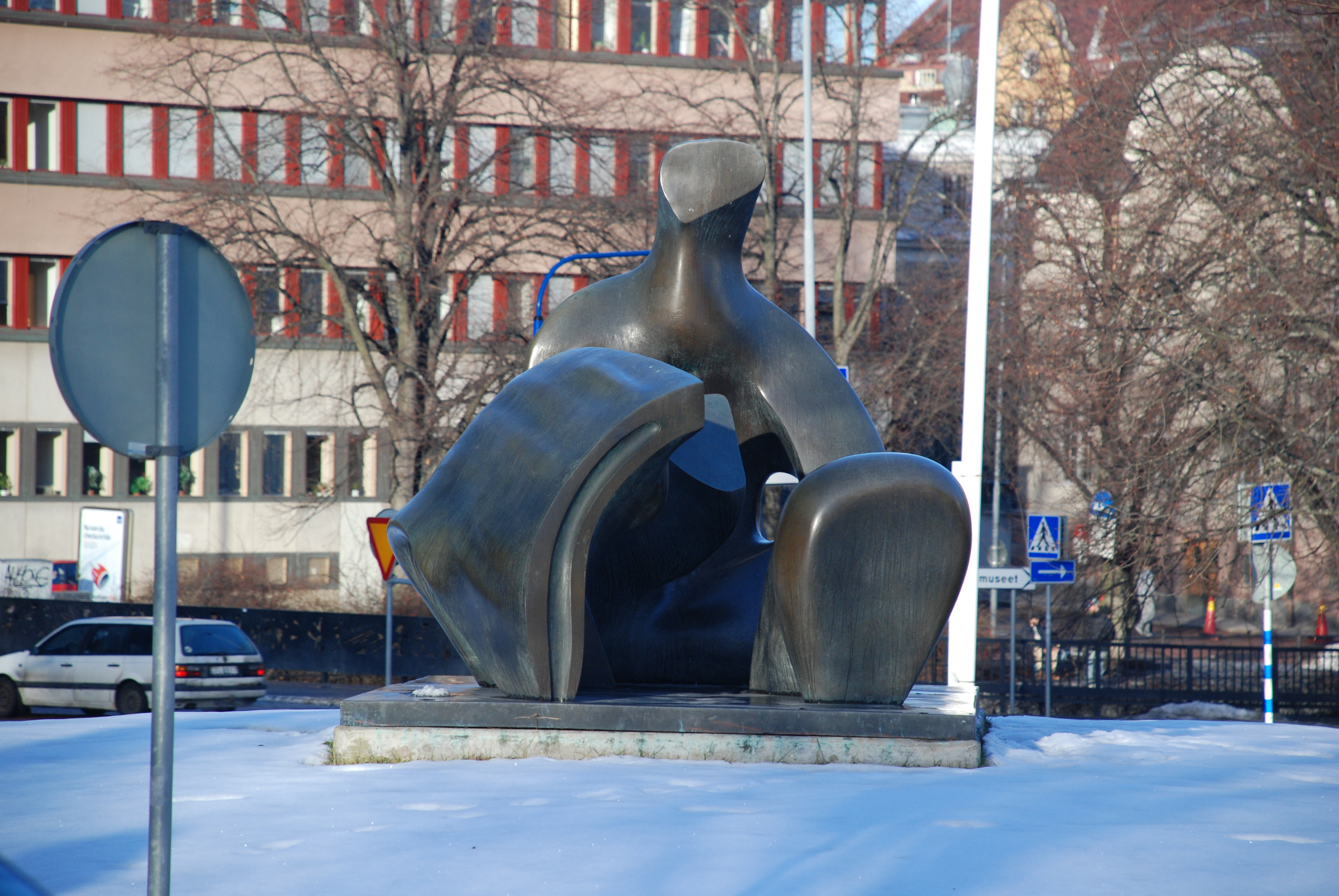 Sculpture by Henry Moore in Gävle/Sweden Gävle, Sweden.